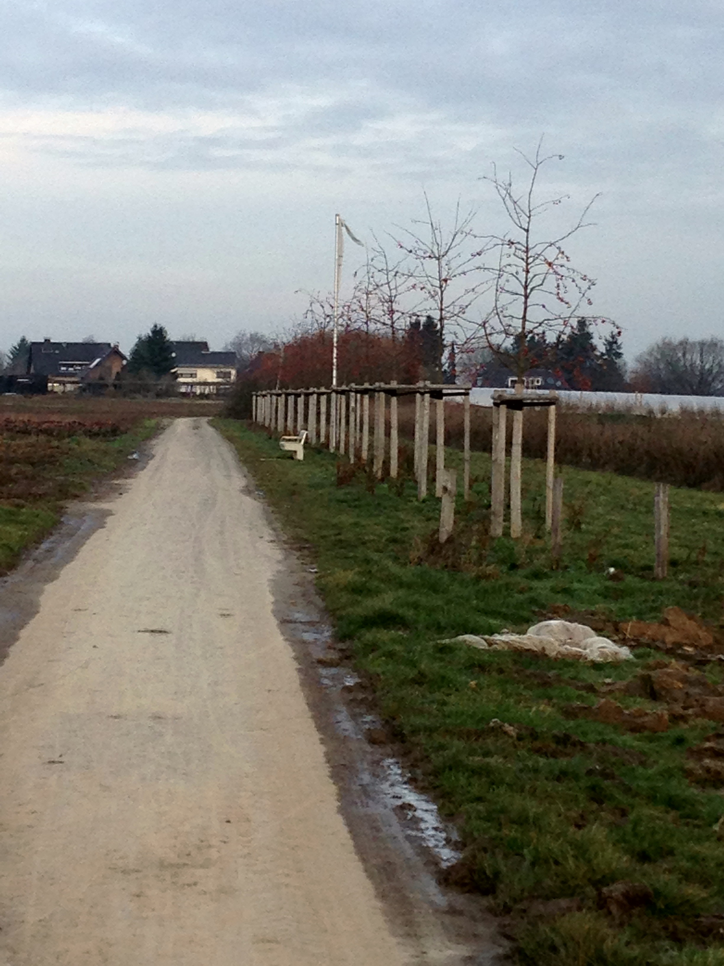 Baumreihe bei Alfter